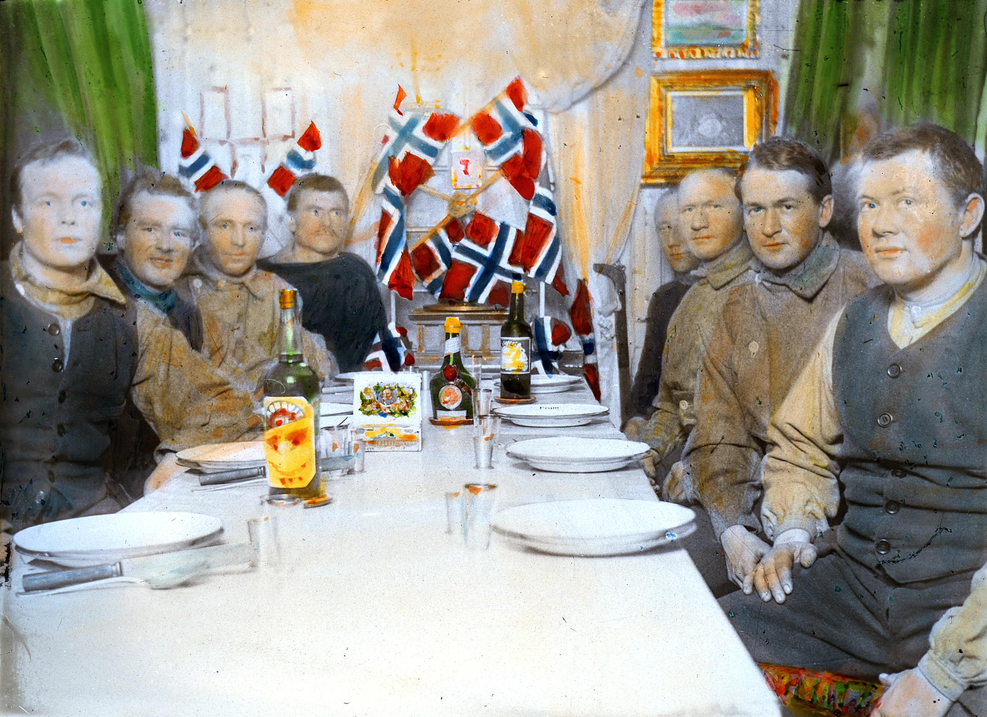 Tittel / Title: Festmiddag i Framheims stue Motiv / Motif: Kolorert glasspositiv. Rundt bordet sitter Olav Bjaaland, Sverre Hassel, Oscar Wisting, Helmer Hanssen, Roald Amundsen, Hjalmar Johansen, Jørgen Stubberud og Kristian Prestrud. Dato / Date: 1911/1912 Fotograf / Photographer: ukjent / unknown Sted / Place: Antarktis, Hvalbukta, Framheim Eier / Owner Institution: Nasjonalbiblioteket / National Library of Norway Lenke / Link: Bildesignatur / Image Number: bldsa_NPRA0644